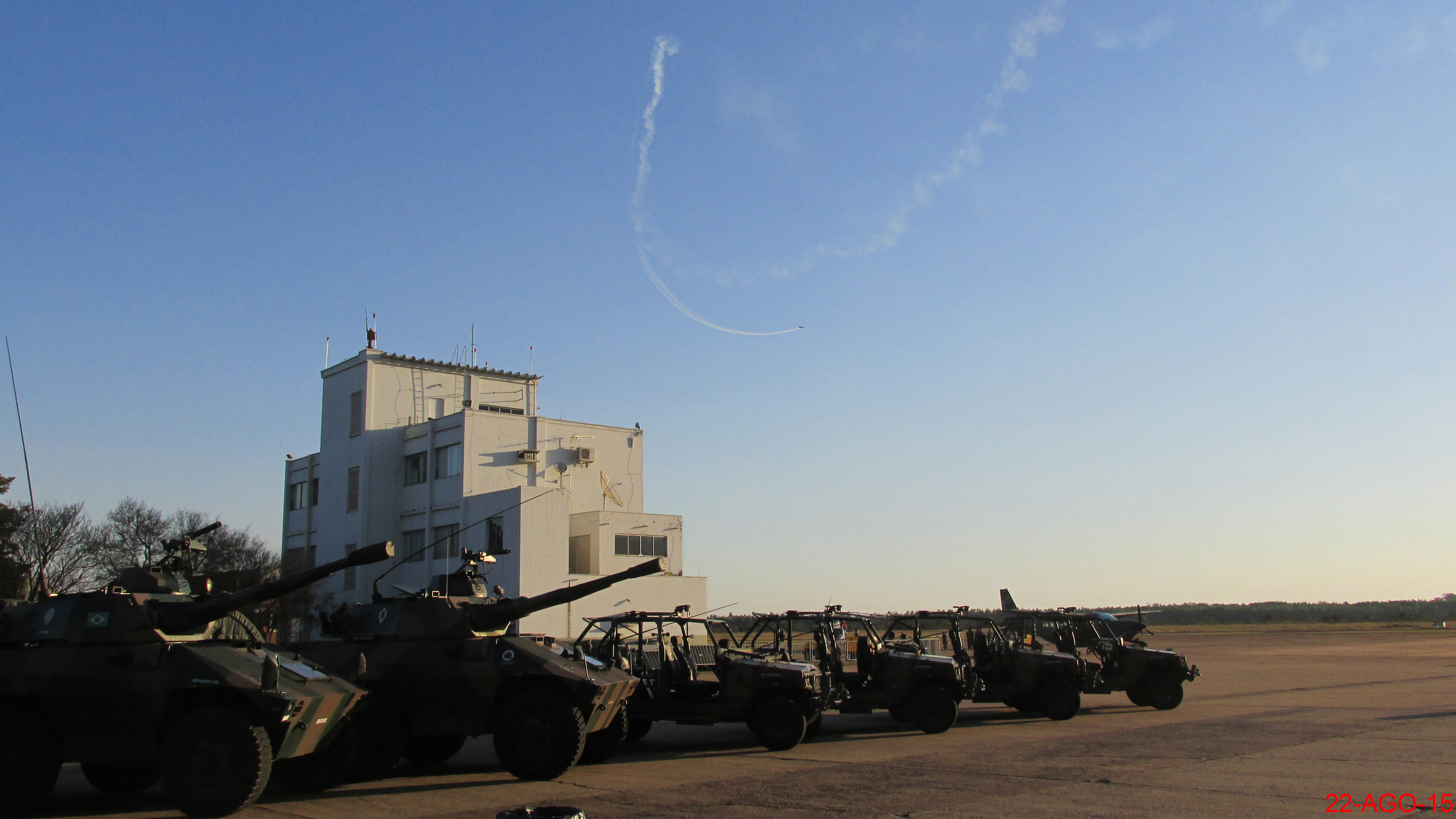 O 13º Regimento de Cavalaria Mecanizada (13º RCMec) ou Esquadrão Anhanguera, posicionando os veículos para a exibição no Domingo Aéreo 2015 em Pirassununga/SP. A junção do 2º Regimento de Carros de Combate e do 11º Esquadrão de Cavalaria Mecanizado deu origem ao 13º Regimento de Cavalaria Mecanizado, passando a ser orgânico da 11 ª Brigada de Infantaria Leve, com sede em Campinas/SP. Atualmente o 13º Regimento de Cavalaria Mecanizada (13º RCMec), com base em Pirassununga é dotado de viaturas leves Marruá e blindados sobre rodas, Urutu e Cascavel Em destaque os blindados Cascavel e os veículos leves Marruá. Ao fundo um Cessna Caravan da FAB e um avião acrobático em treinamento para o Domingo Aéreo 2015.